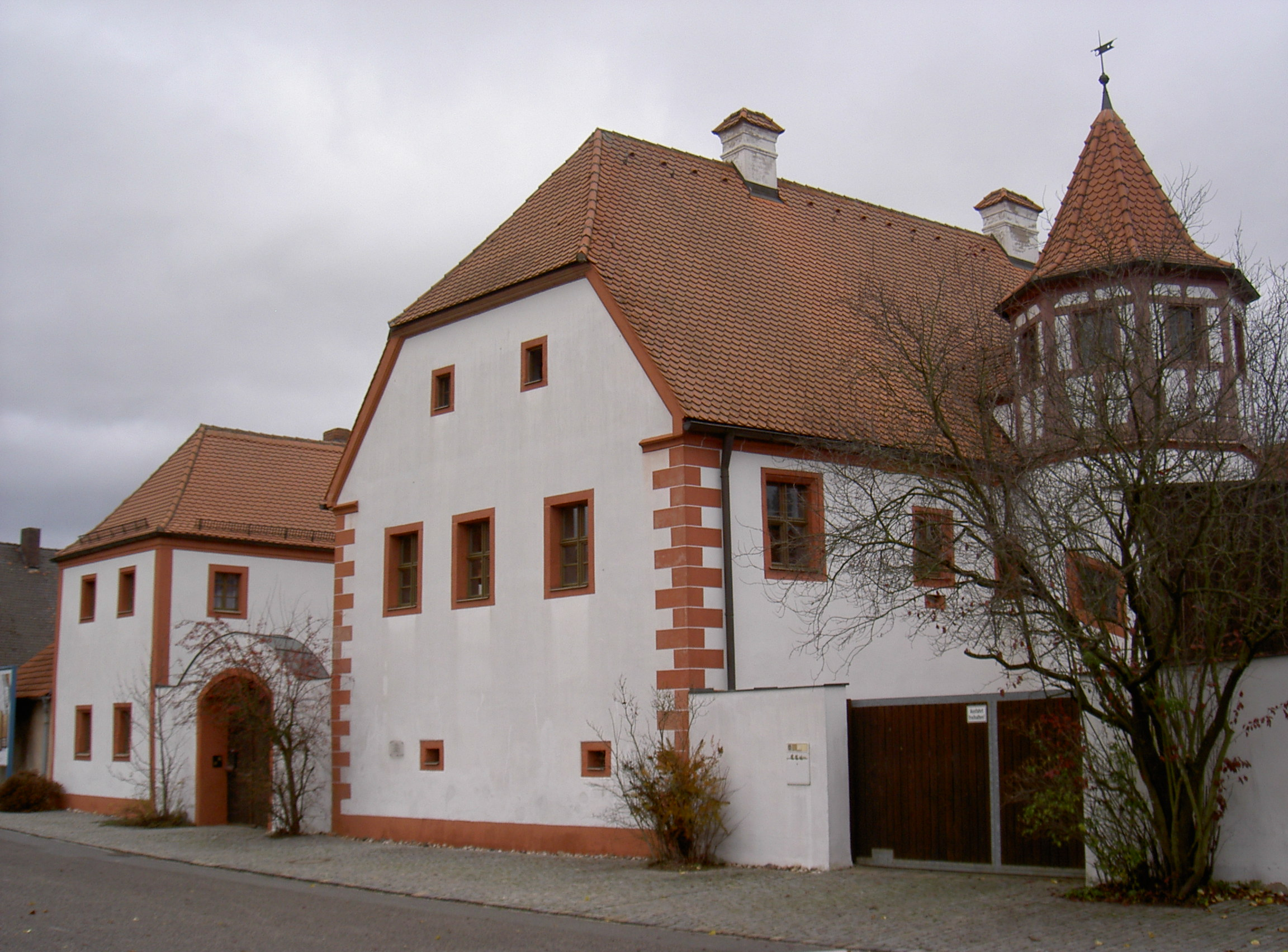 Axtheid 3